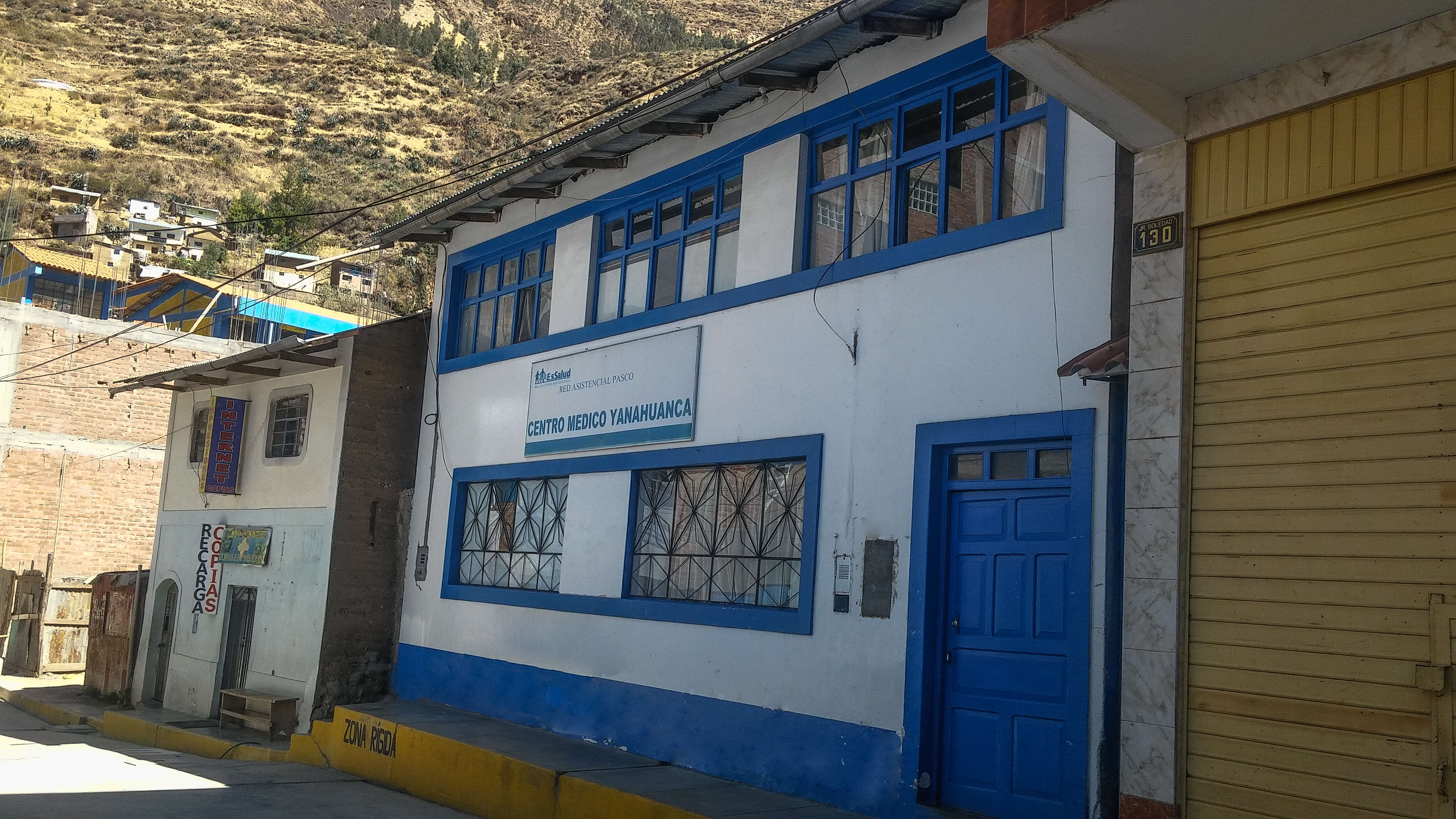 Local del CAP II Yanahuanca en Jr Jorge Chavez s/n Yanahuanca